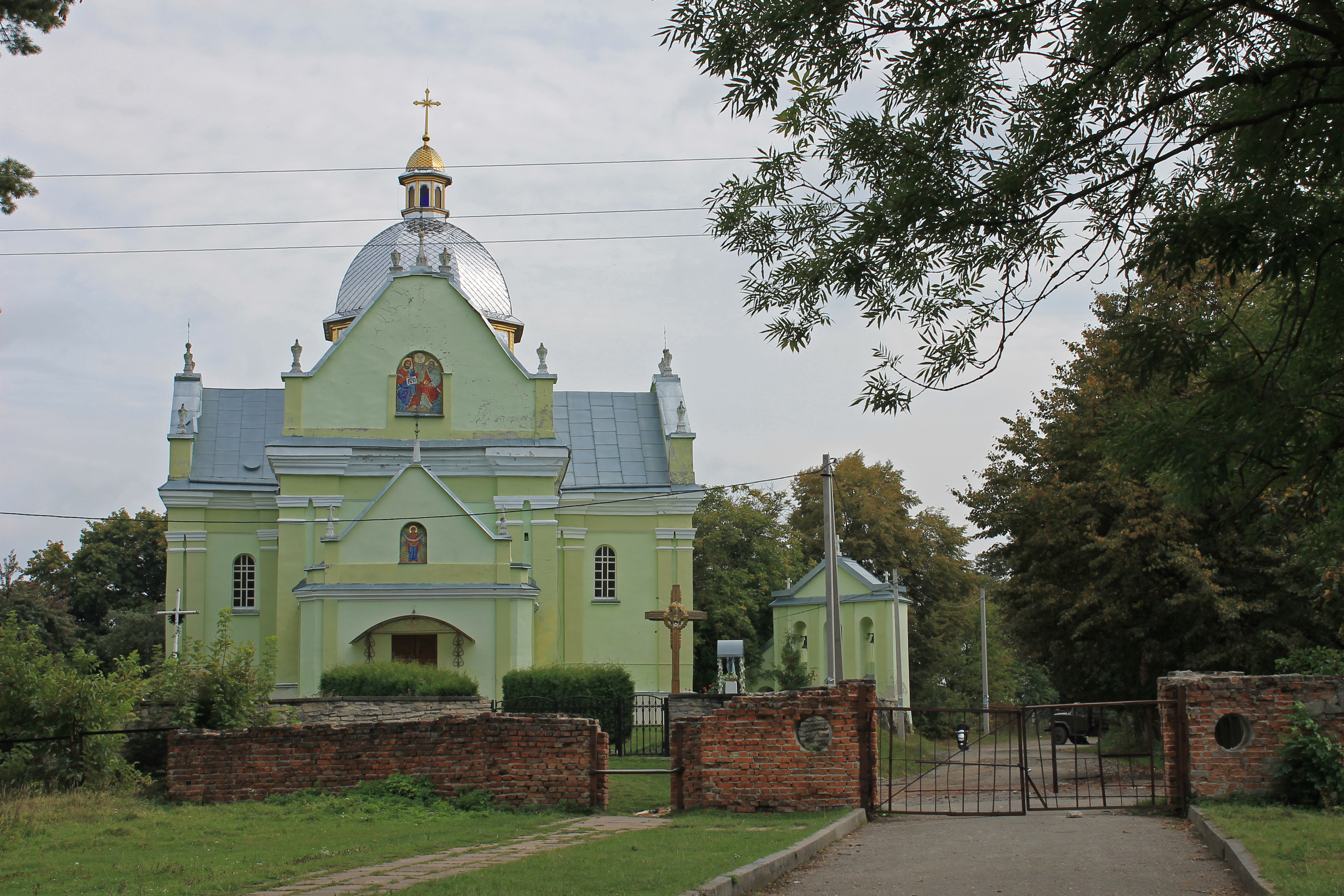 Костел Успіння Богородиці. с.Свірж, Перемишлянський р-н., Львівська обл.